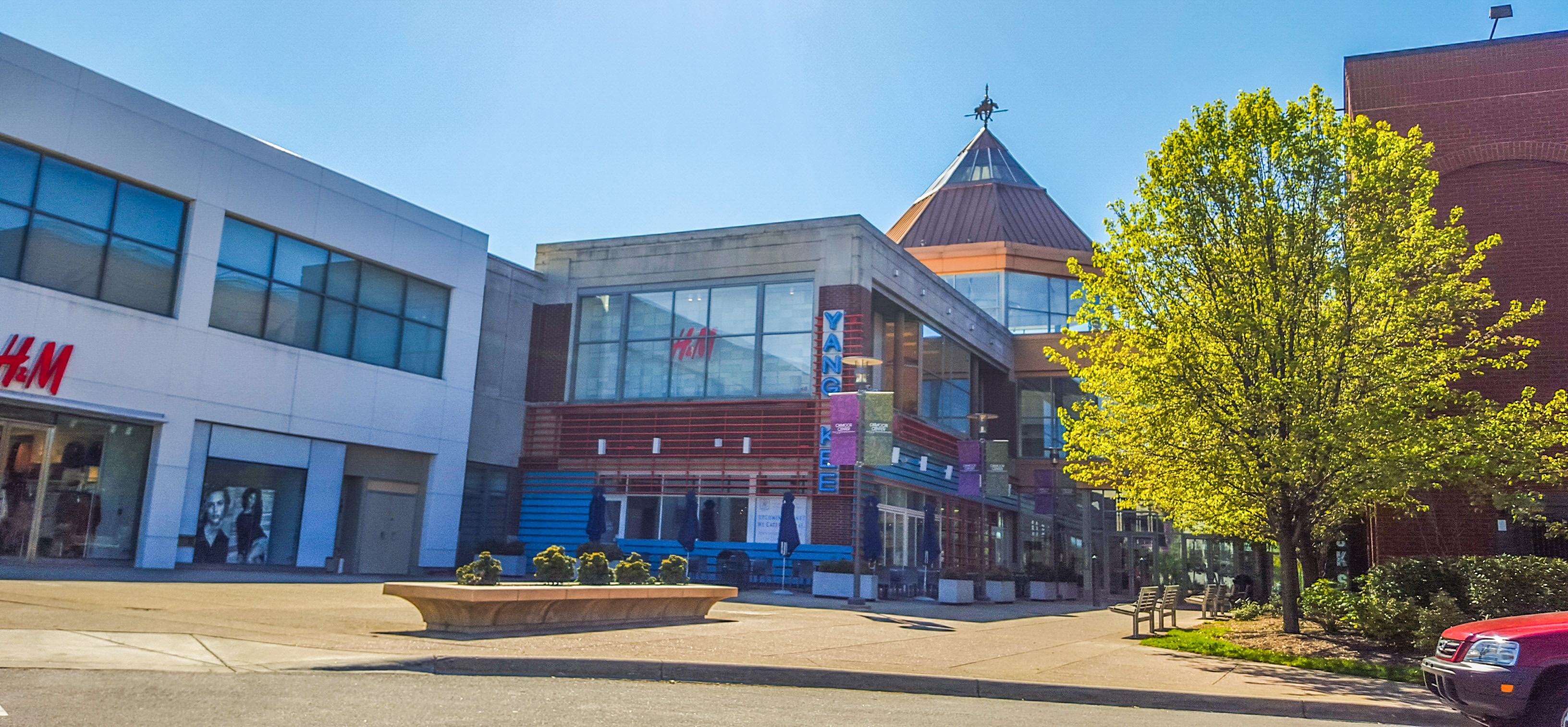 Oxmoor Center Louisville, KY